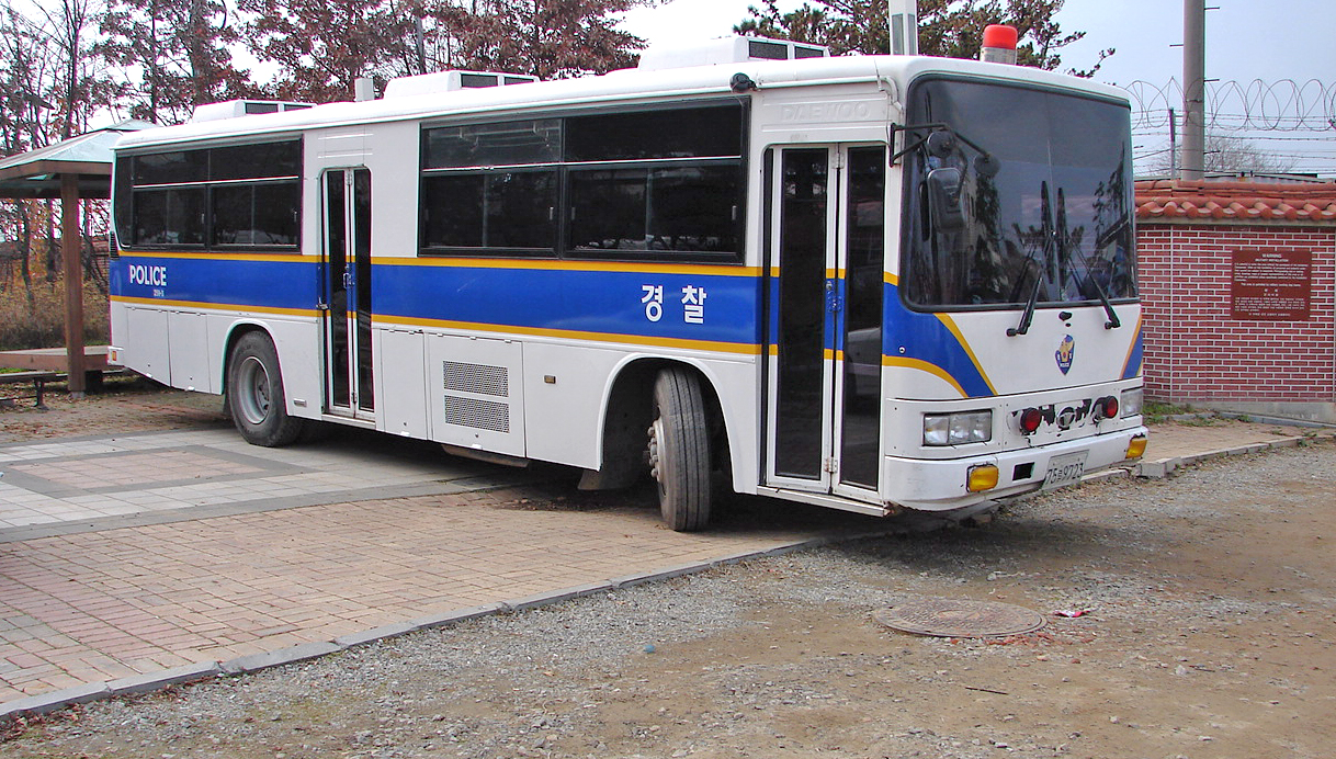 Daewoo police bus